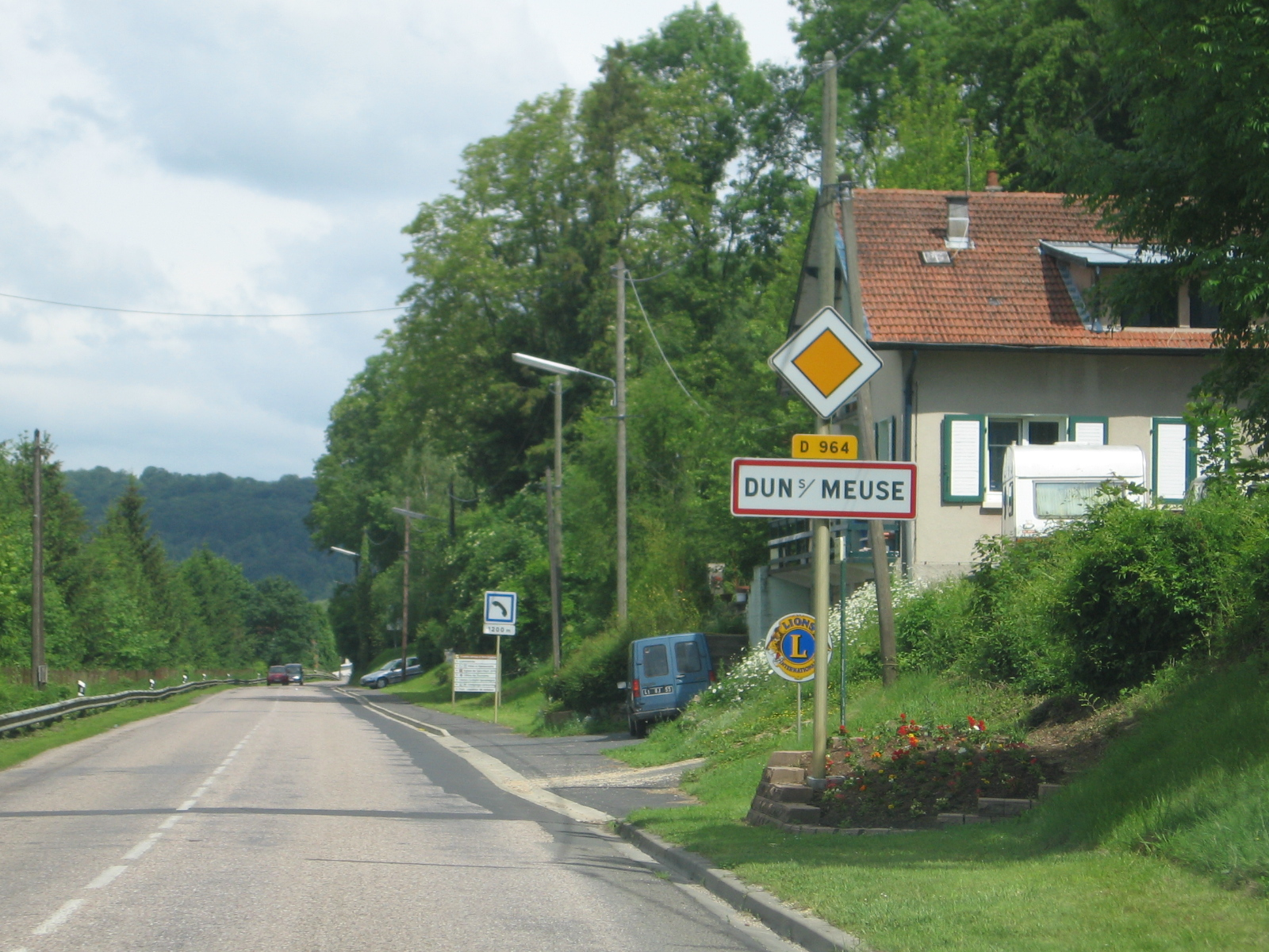 Dun-sur-Meuse